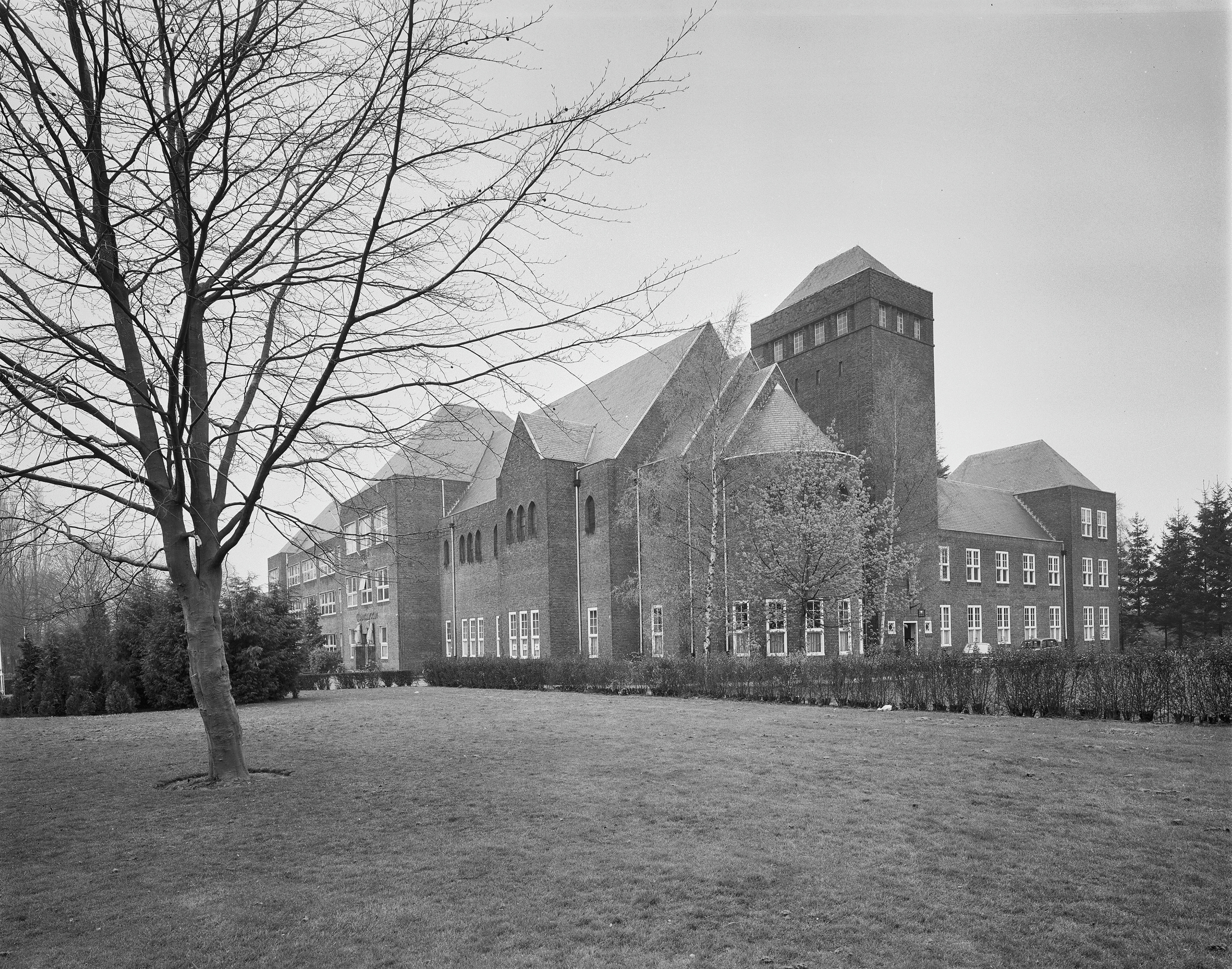 CARMELLYCEUM: Exterieur OVERZICHT SCHOOL, KAPEL